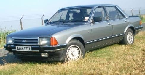 1984 Mk2 Series 2 Ford Granada 2.8 Ghia X